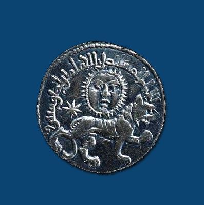 سكه دوران سلجوقی، با نقش شیر و خورشید. اين سكه در دوران حكومت كیخسرو دوم، پادشاه سلجوقی از سال 635 تا 644 هجري. اين اولین سكه با این نقش به شمار می رود. عكس از مجموعه شخصی